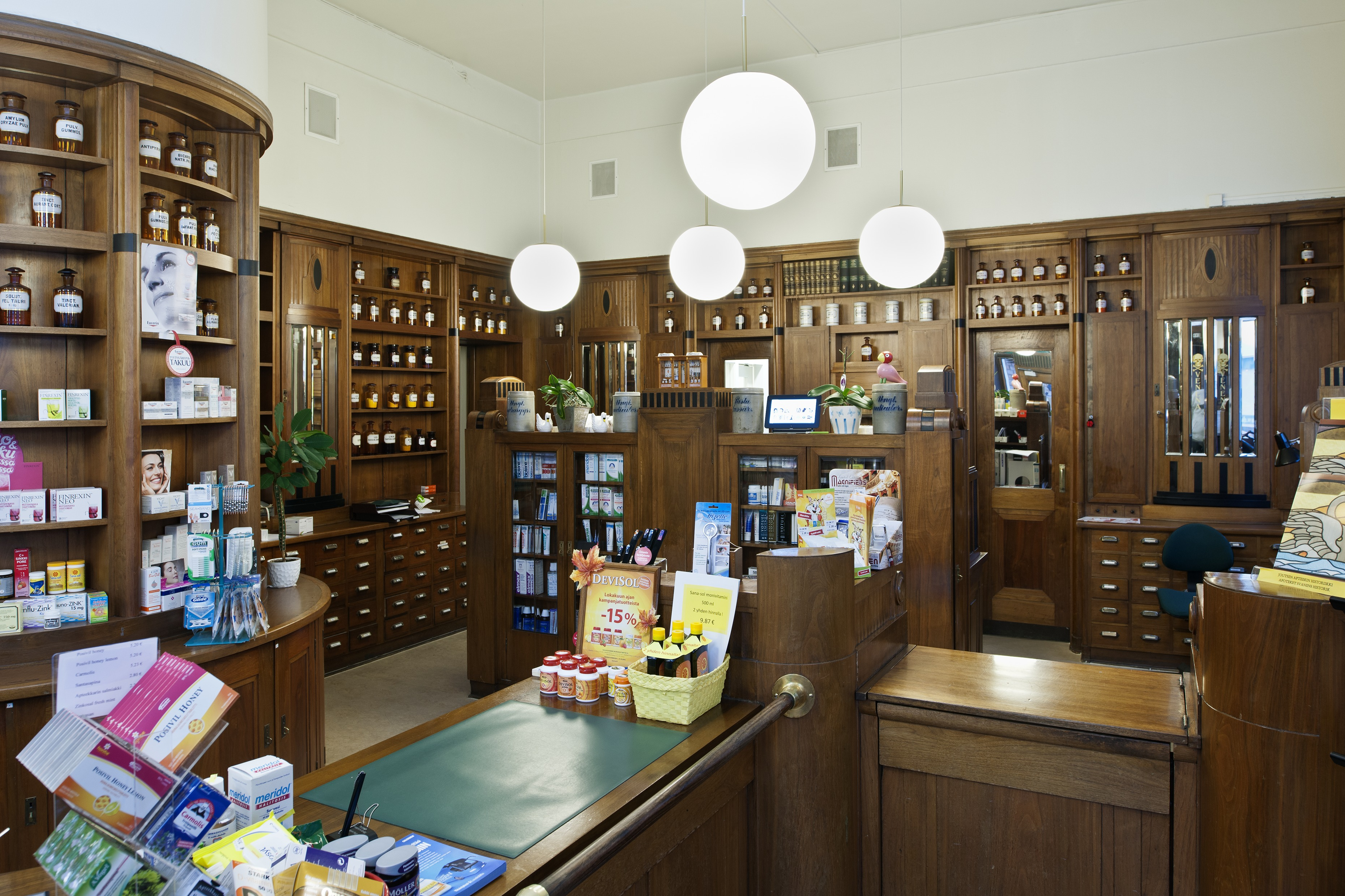 Joutsen apteekki, Lapinlahdenkatu 1a – Eerikinkatu 19. Suunnittelija Selim A. Lindqvist, 1912.